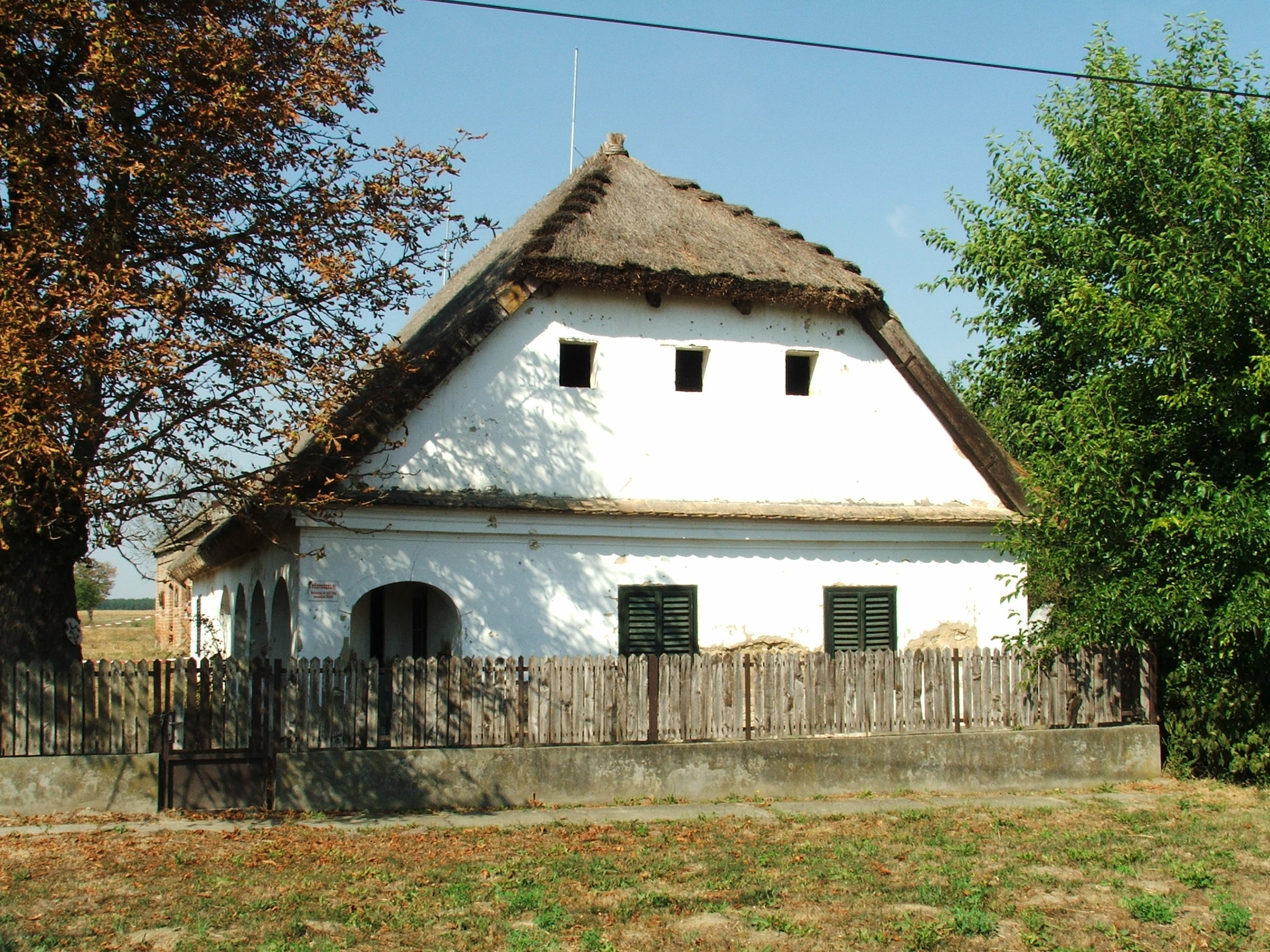 tájház, Istvándi This is a photo of a monument in Hungary. Identifier: 7902